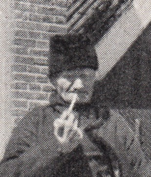 Fischersleute in Volendam um 1930